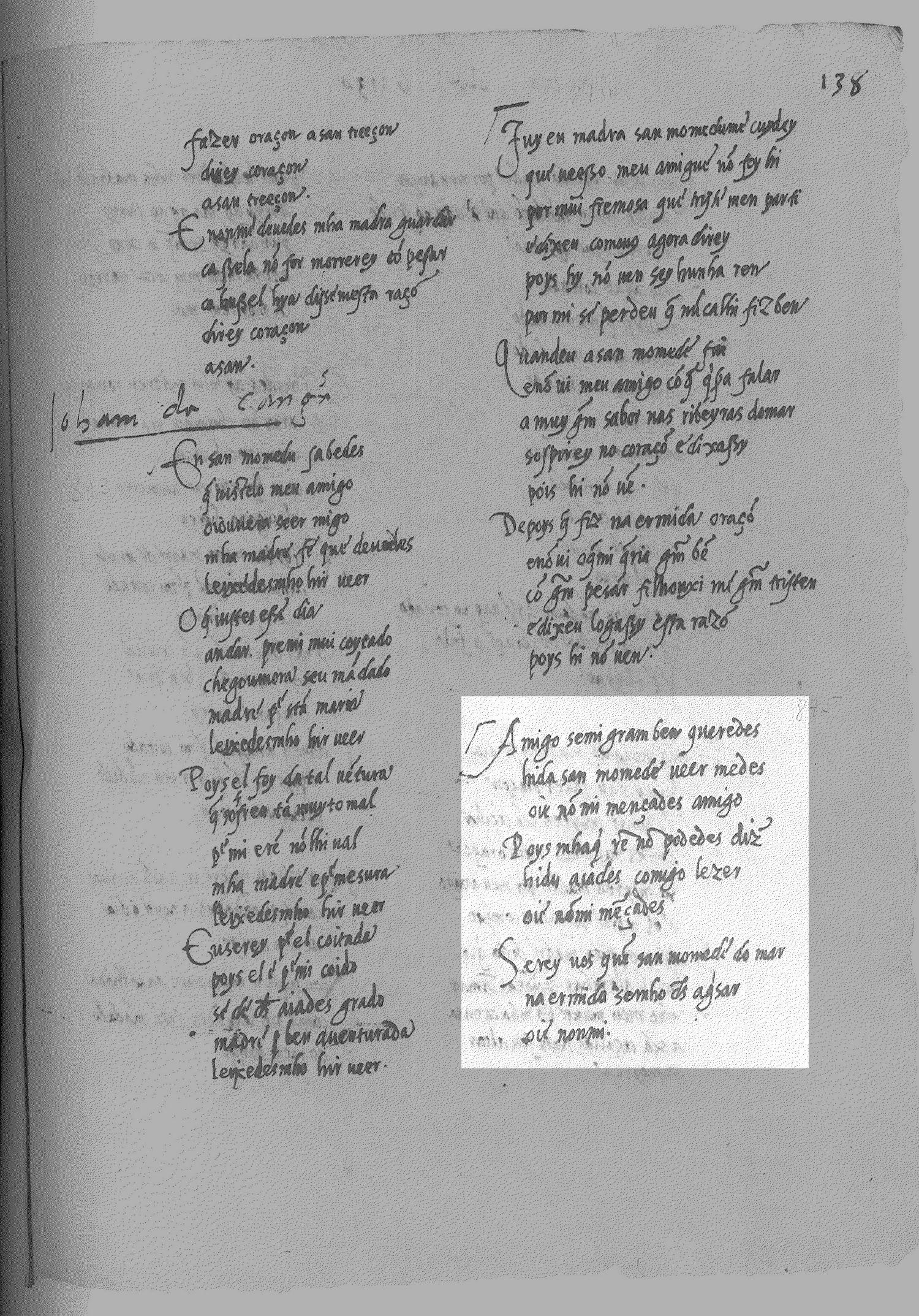 Cancioneiro da Vaticana - V 875